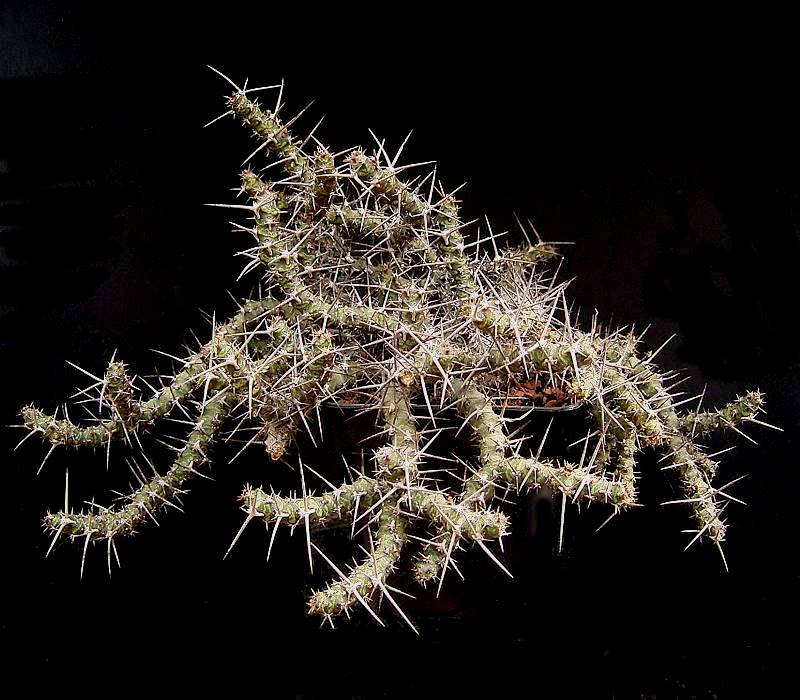 Euphorbia quadrispina